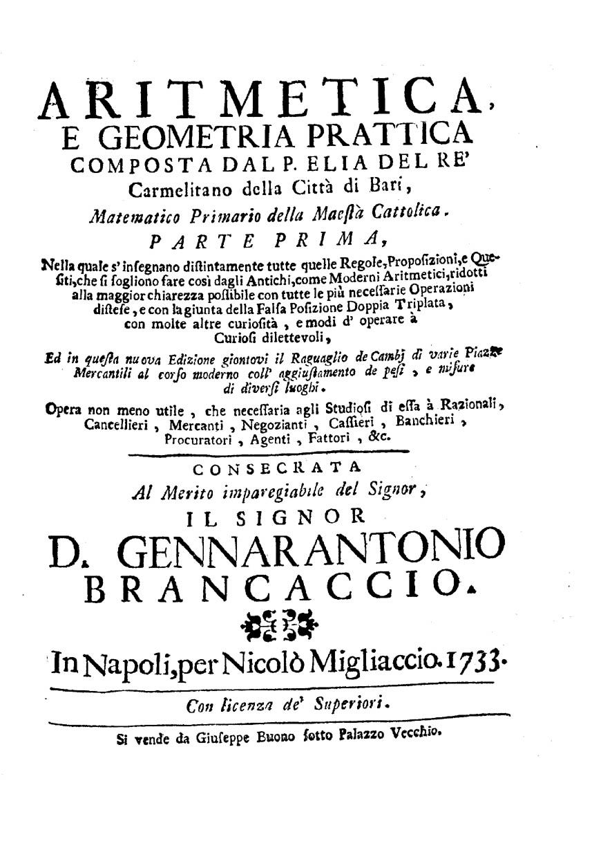 Aritmetica, e geometria prattica composta dal p. Elia Del Re carmelitano della città di Bari, ... Parte prima [-seconda], nella quale s'insegnano distintamente tutte quelle regole, proposizioni, e quesiti, che si sogliono fare così dagli antichi, come moderni aritmetici .... - In Napoli : per Nicolo Migliaccio : si vende da Giuseppe Buono sotto Palazzo Vecchio, 1733. - 2 pt. ([8], 351, [1]; 344 p., 36 p. di tav.) : ill. ; 4º .